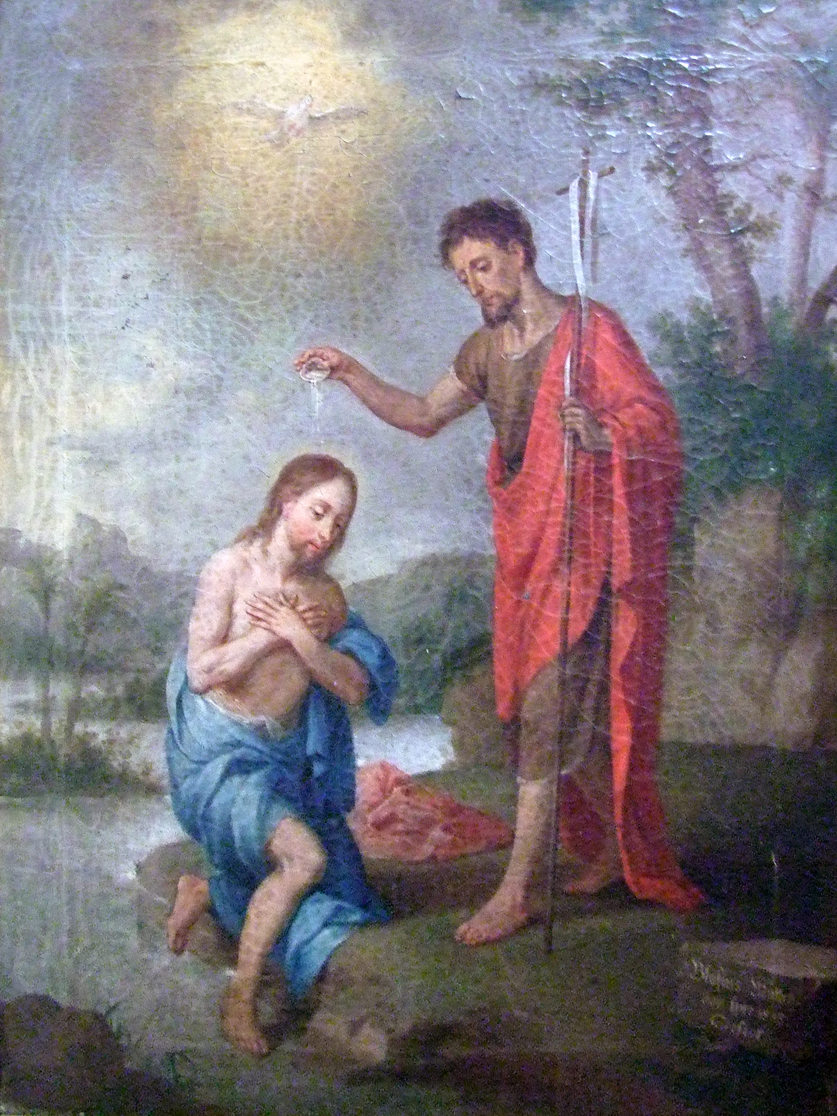 St. Agatha in Illerrieden, Chorgemälde, Tafelbild links: Taufe Jesu